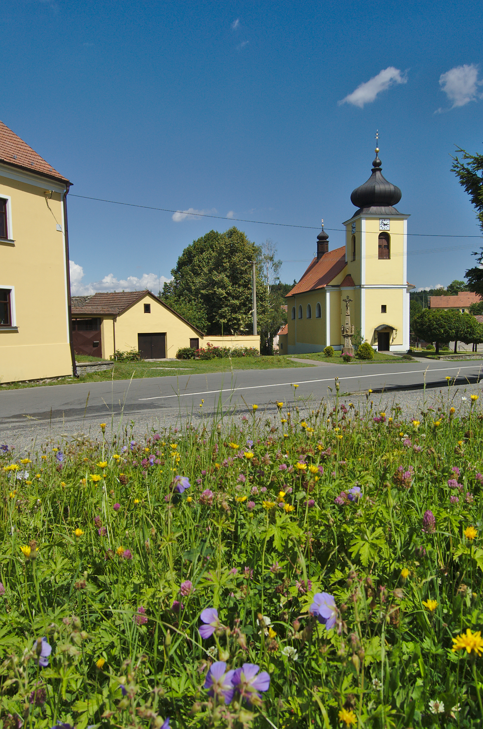 Kostel svatého Vavřince, Horní Štěpánov, okres Prostějov